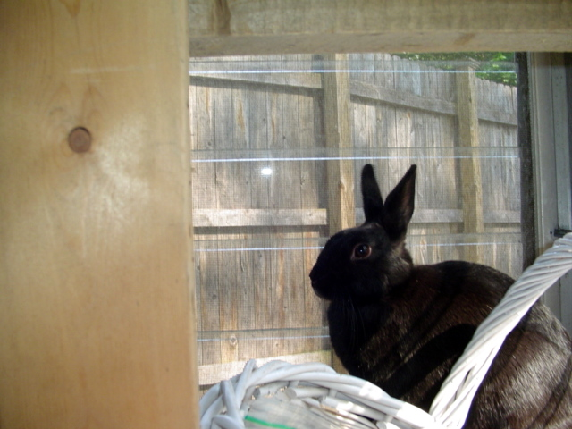 A black dwarf bunny on a windowsill